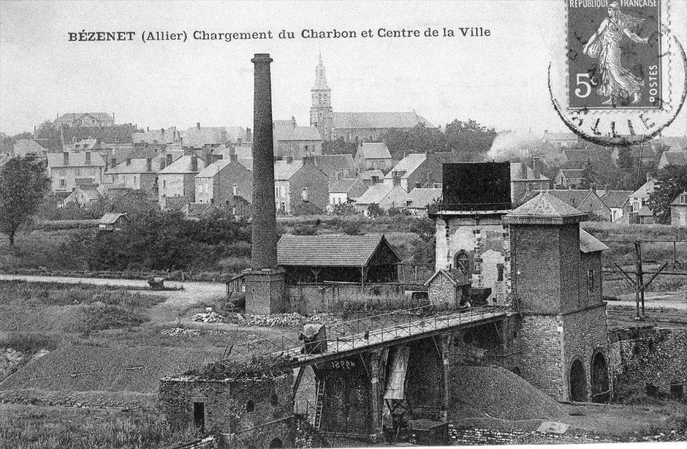 Chargement du charbon des houillères de Bézenet et village an arrière-plan.